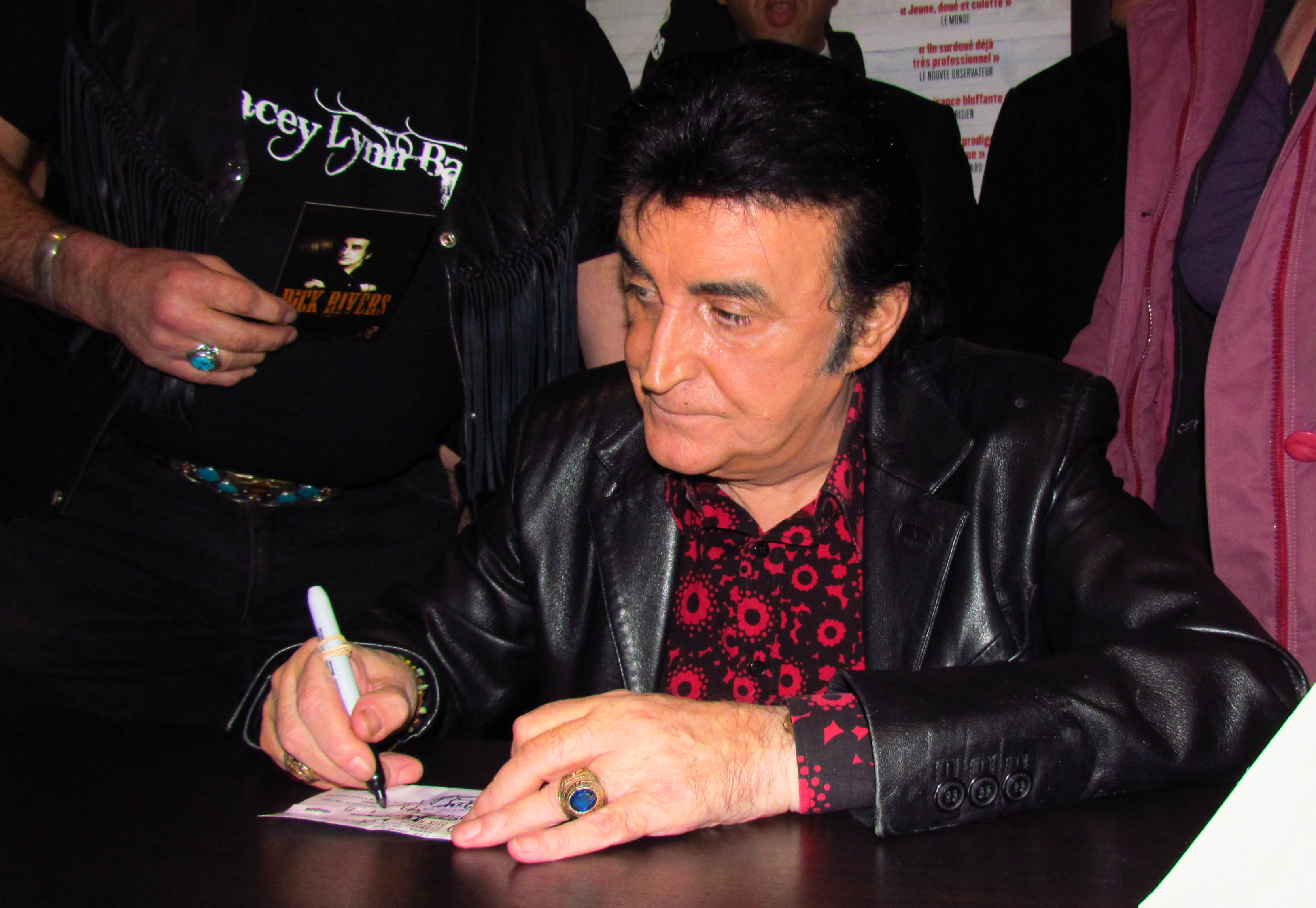 Séance de dédicace d'après concert, crédit photo :Bemelmans Michaël.